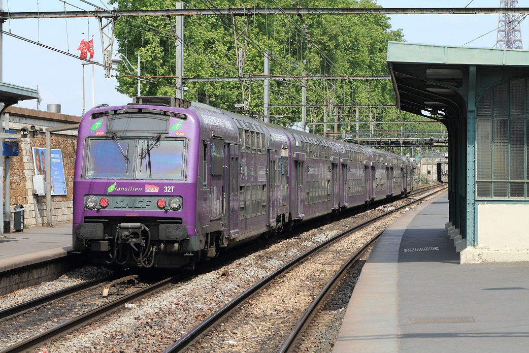 La Z 5663/64 en livrée "violette" vue ici à la gare de Javel en direction des Invalides, Paris, France.